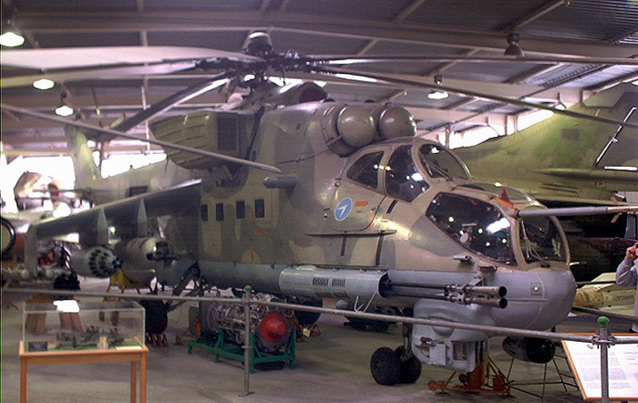 Mil Mi-24 Hind